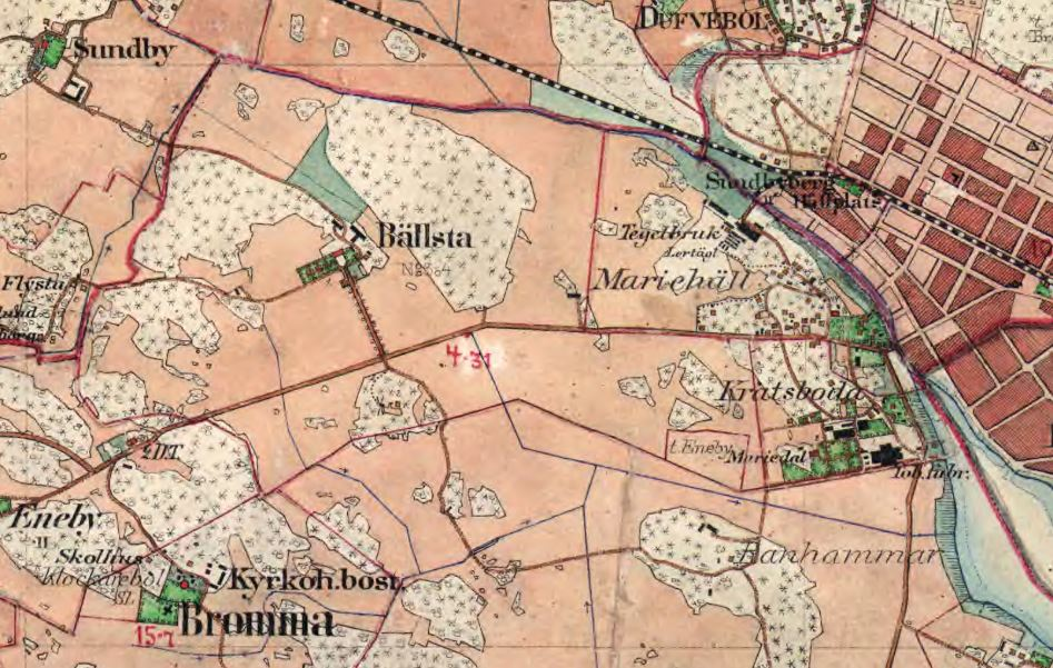 Bällsta, Sundby, Bromma på Häradsekonomiska kartan